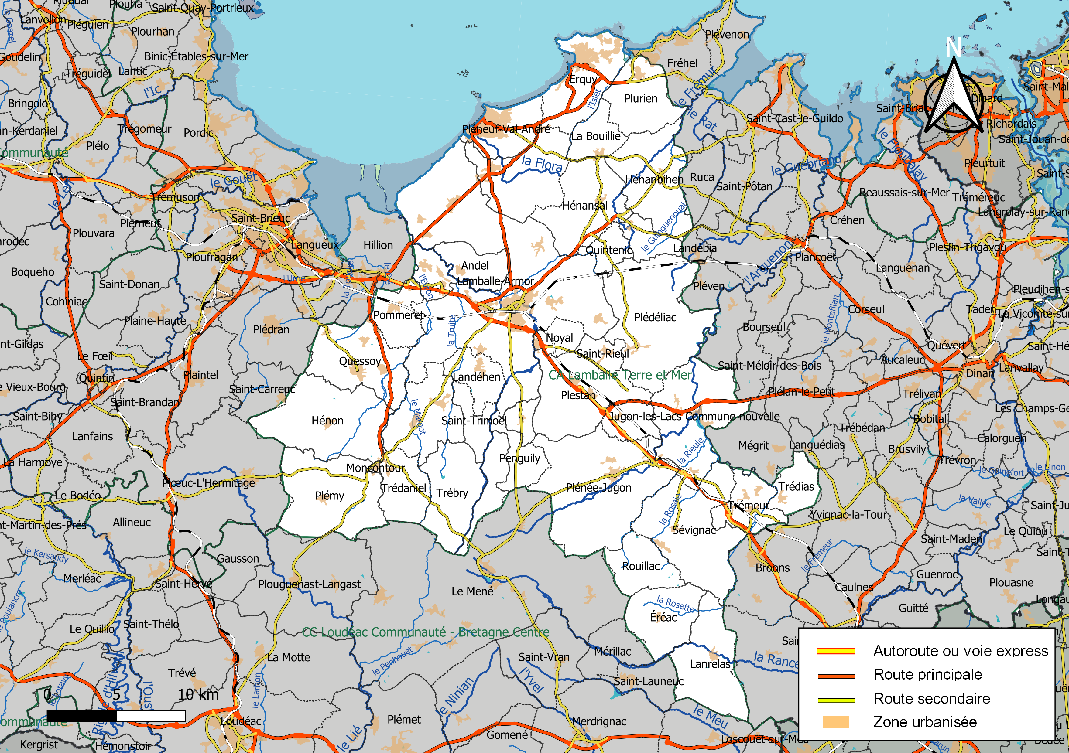 Carte géographique de l'intercommunalité Lamballe Terre et Mer, département des Côtes-d'Armor, France. Composition au 1er janvier 2019.